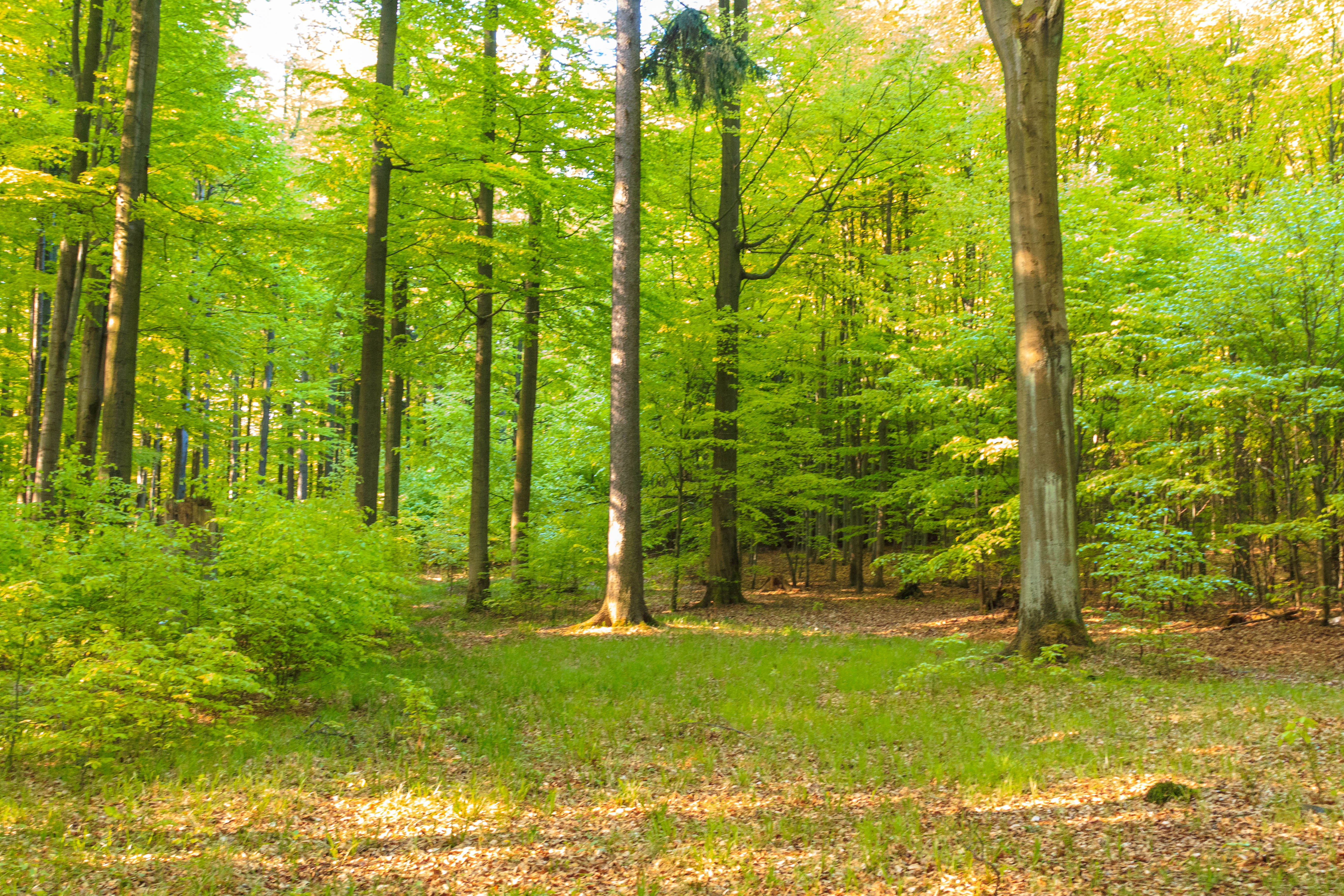 Přírodní památka Bučina - Spálený kopec Project: Chráněná území.